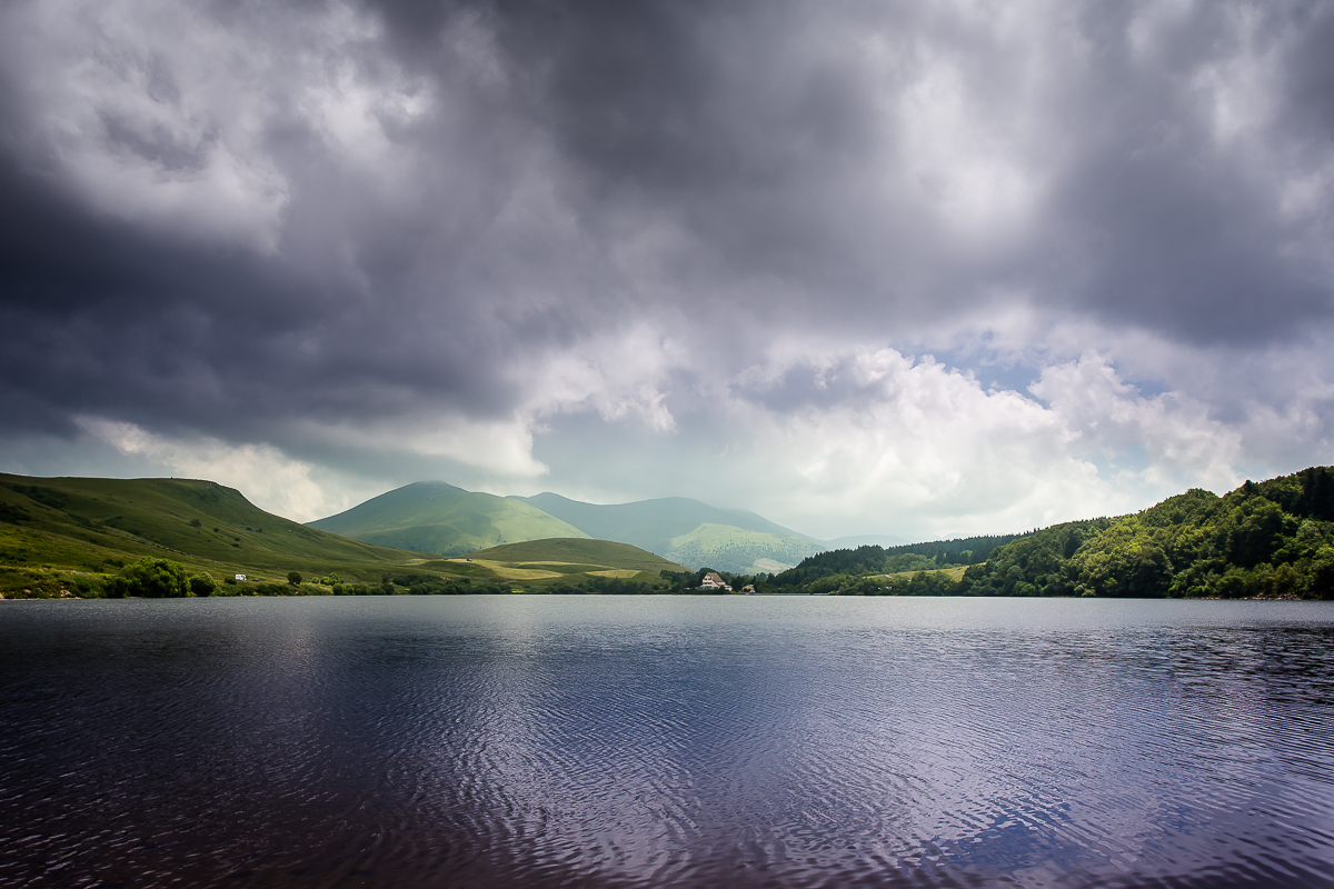 Vue depuis la rive Nord